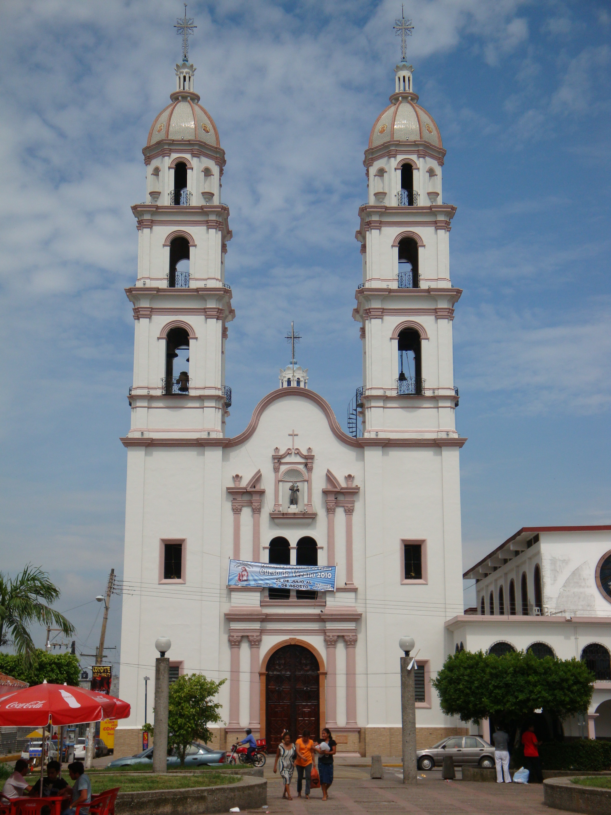 Iglesia de San Antonio de Padua, en la ciudad de Heroica Cárdenas, municipio de Cárdenas, Tabasco, México.